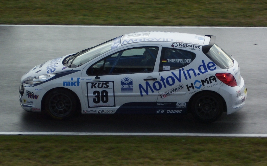 Das Foto zeigt Guido Thierfelder in seinem Peugeot 207 Sport beim 1. Meisterschaftslauf zur ADAC Procar 2012 in Oschersleben.